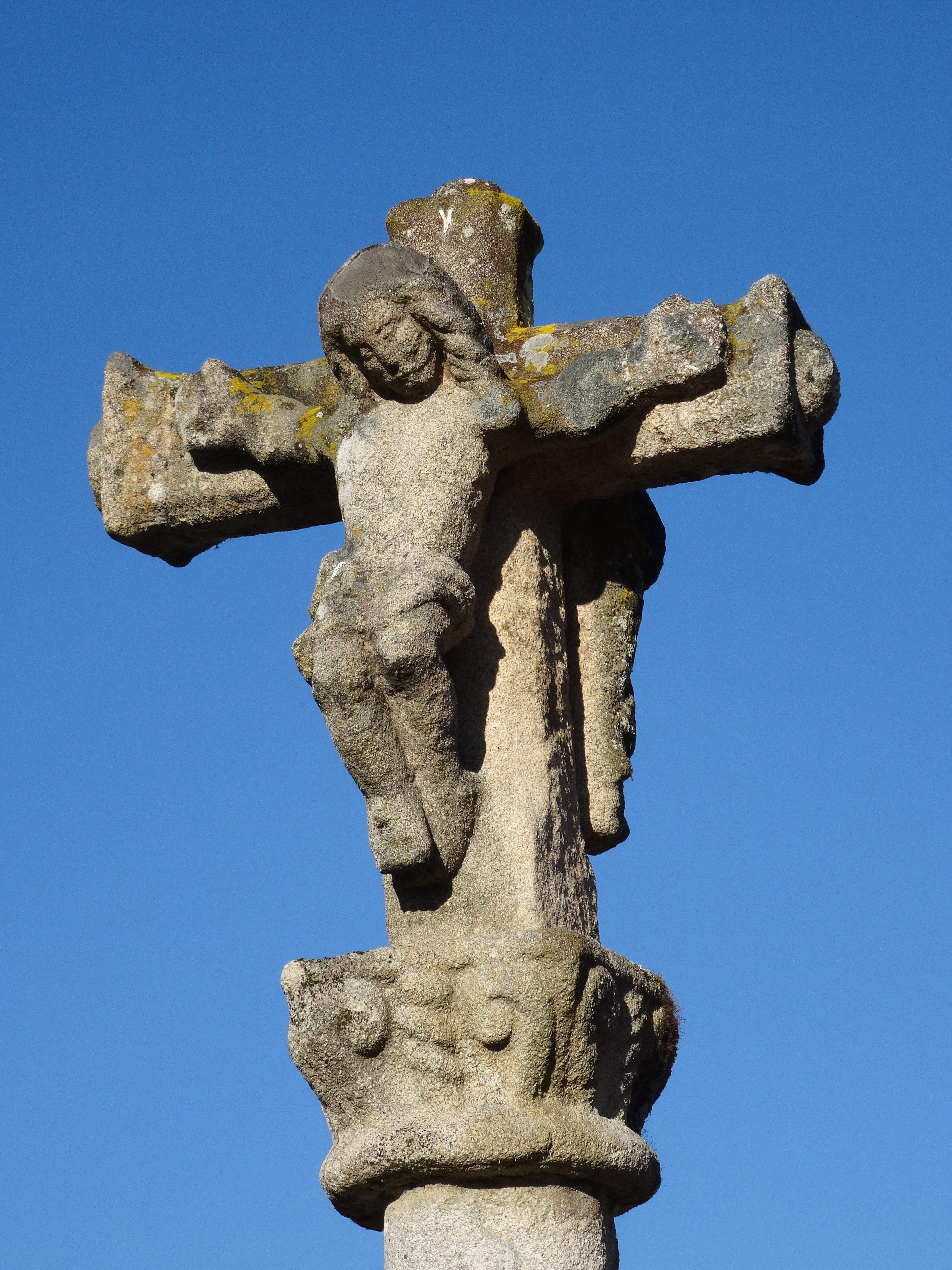 Ver título.